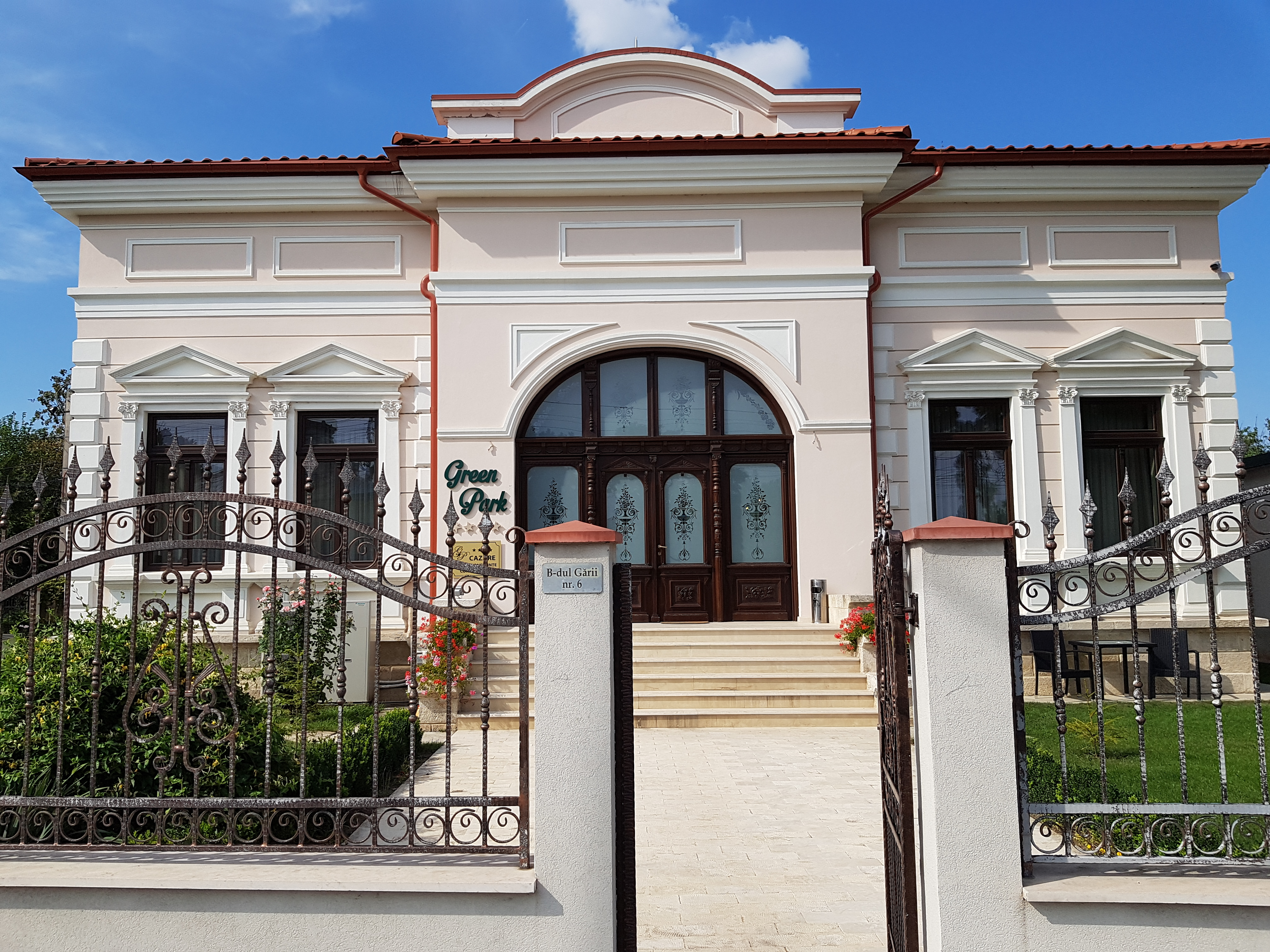 Casa Ibrăileanu, corp C1a